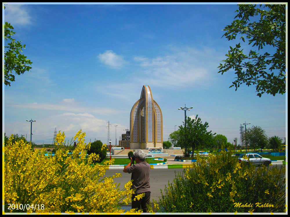 Glasses & photography, ValiAsr Square ناهار سیصد هزار تومانی، میدان ولیعصر قرچک